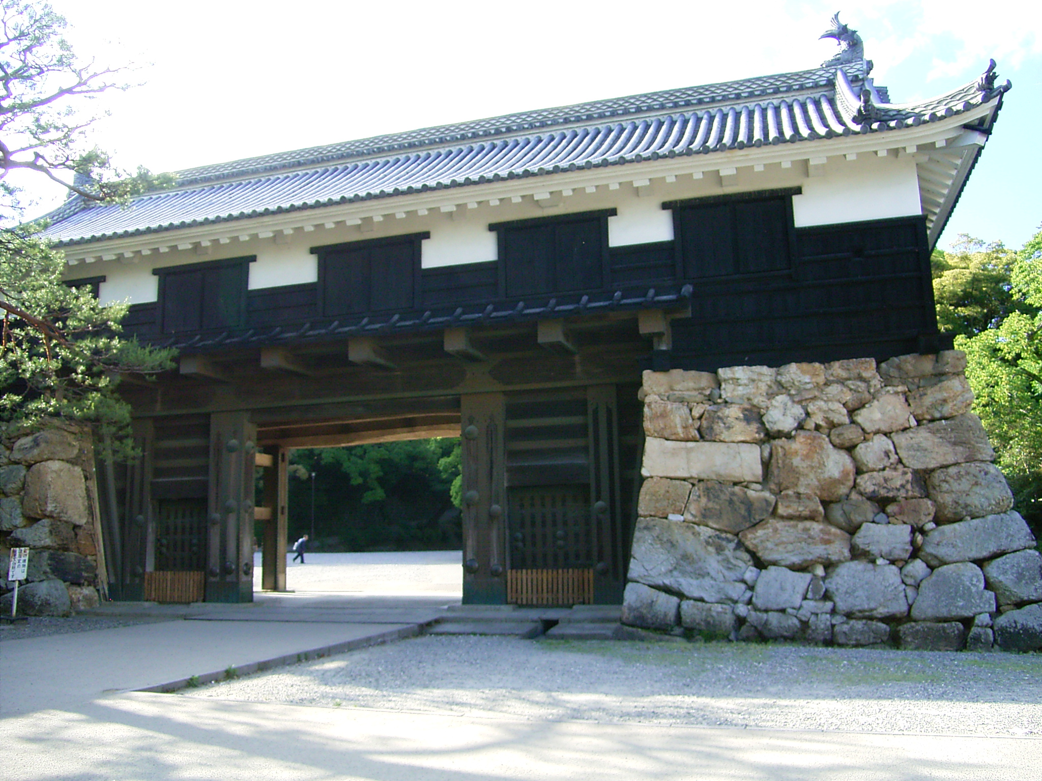 Kochi_Castle(高知城)